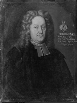 Gemälde in der Professorengalerie Tübingen